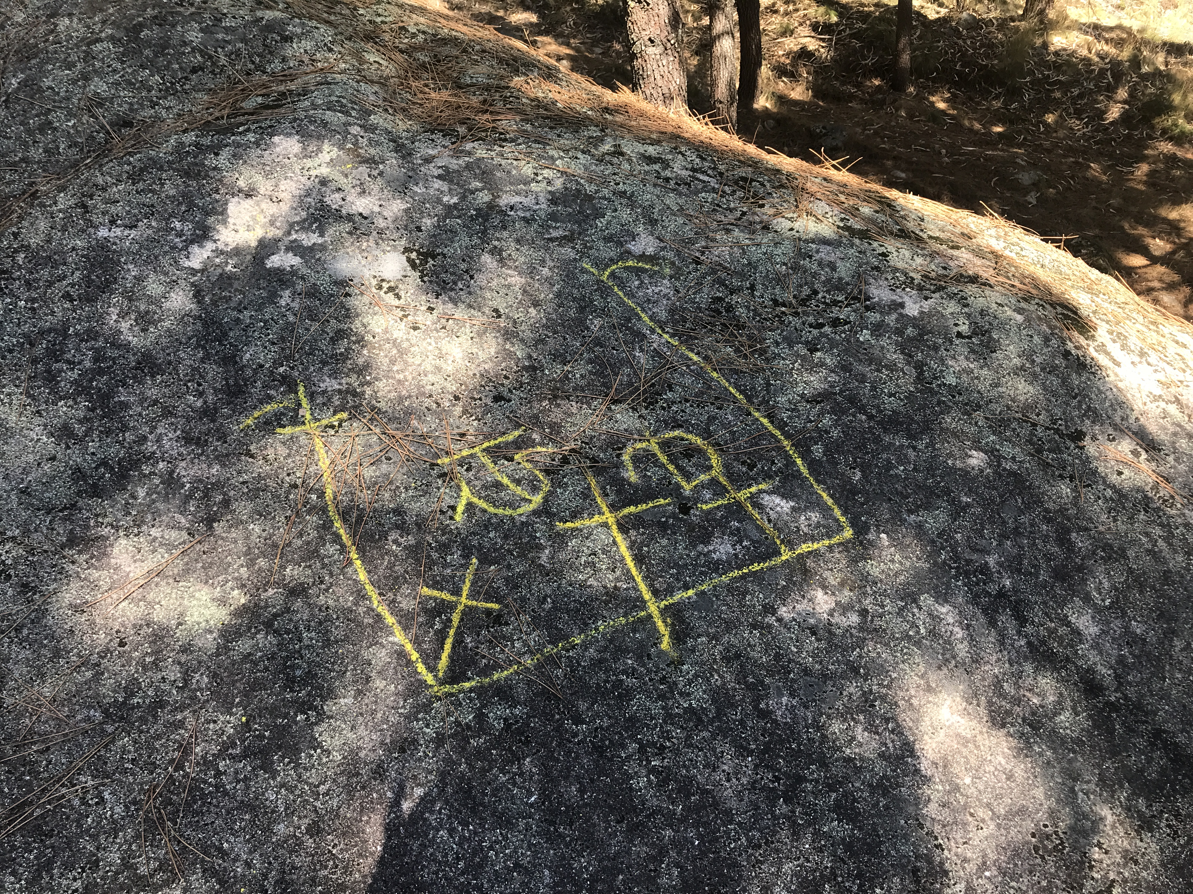 Los petroglifos de Borna están localizados en una roca plana en la ladera del Monte Faro en Borna, en la parroquia de San Pedro de Domaio. También conocido con el nombre del petroglifo de los barcos porque sus motivos recuerdan a embarcaciones, aparecen representadas gran número de cruces, identificadas como figuras esquemáticas de seres humanos combinadas con motivos circulares. Martín Almagro Gorbea, prestigioso arqueólogo catalán, analizó este petroglifo en su estudio sobre las representaciones de barcos en el arte rupestre de la Península Ibérica, describiéndolo como un “conjunto formado por una dársena en forma de U. […] En sus extremos, aparecen representadas dos señales diferentes; a la derecha está dibujado un espolón y un segmento perpendicular al dique, mientras que en el dique izquierdo finaliza con un solo espolón. Dentro de la dársena se aprecia la representación de tres pantalanes y de dos embarcaciones. A la derecha del puerto representaron tres embarcaciones, las dos primeras parecen del mismo tipo y la tercera tendría mástil”. Su cronología es problemática ya que hay grabados que podrían ser adscritos a la Edad del Bronce, Edad Media, Edad Moderna y Contemporánea.